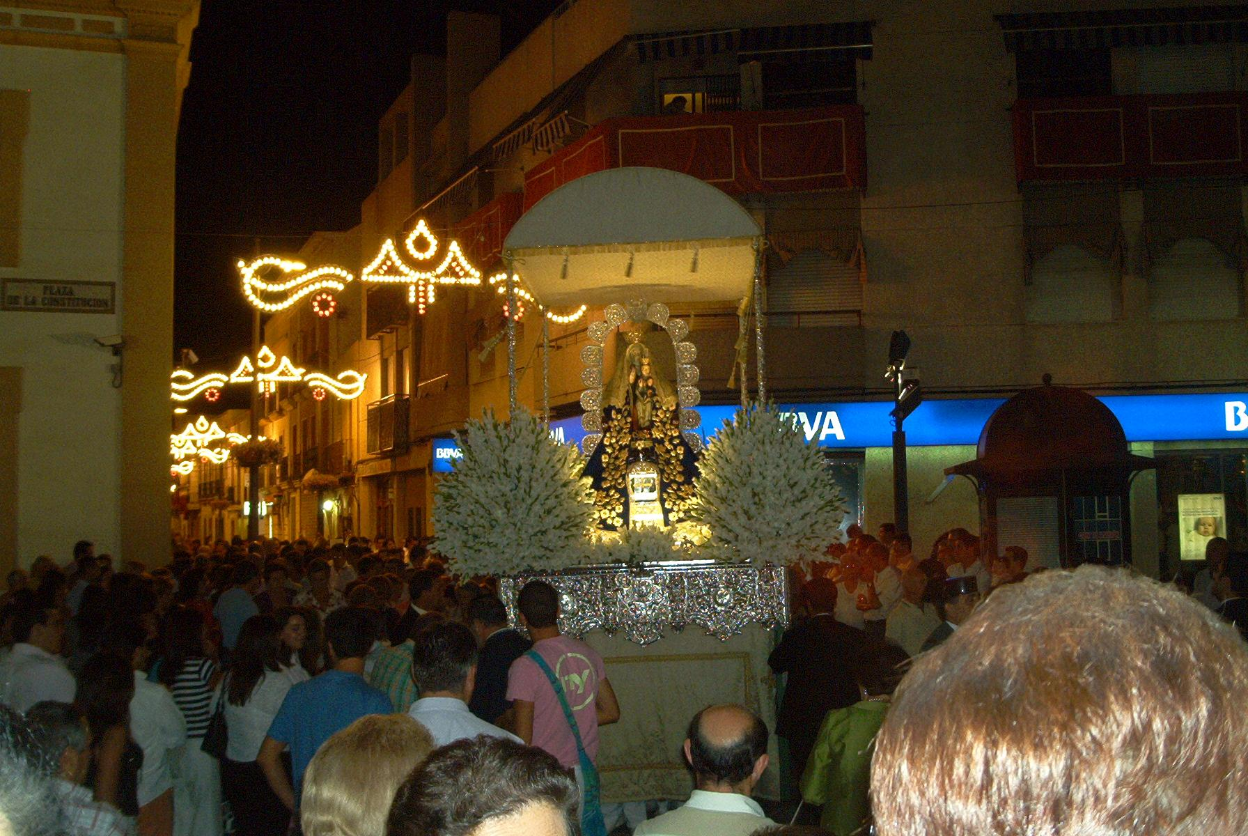 Procesión de la Patrona de Dos Hermanas en 2006